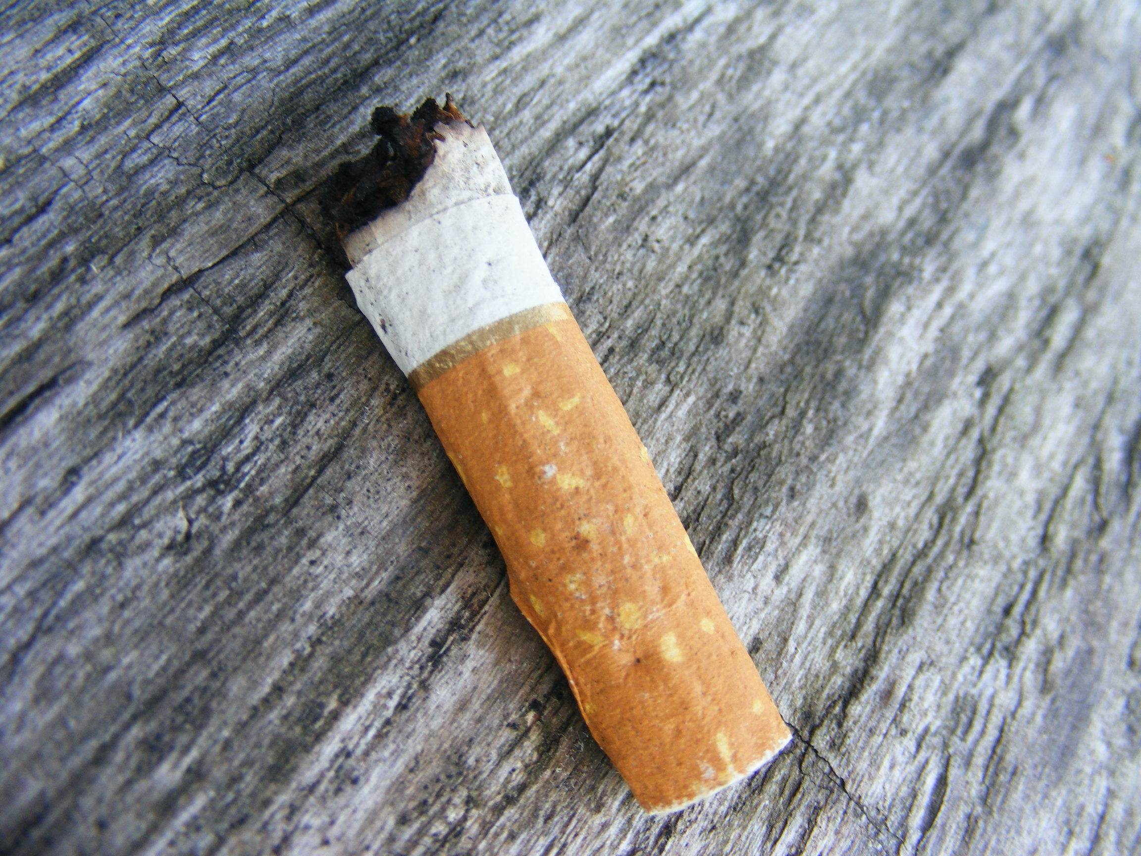 Kiep